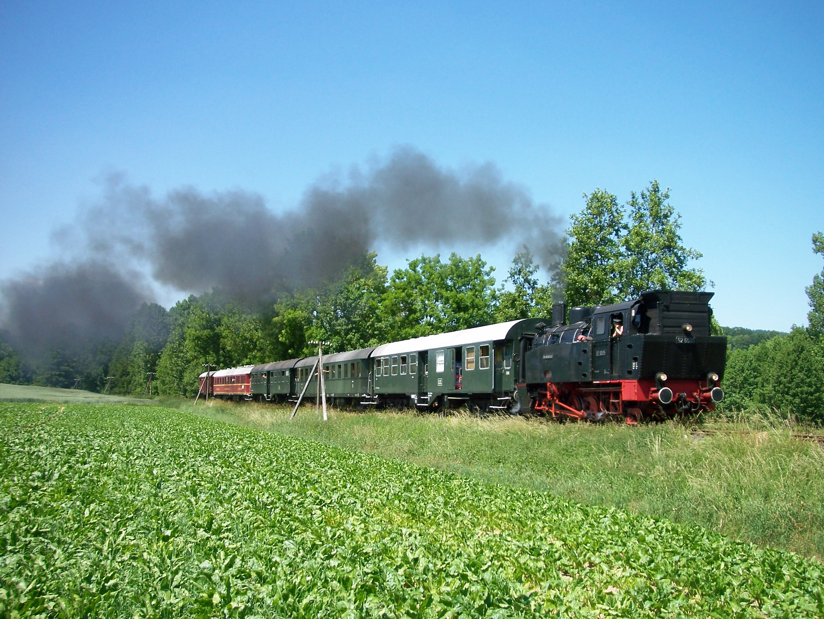 Dampflok Emil Myrisch Nr. 3 mit dem Museumszug der Landeseisenbahn Lippe e.V. bei Farmbeck (bei Dörentrup).